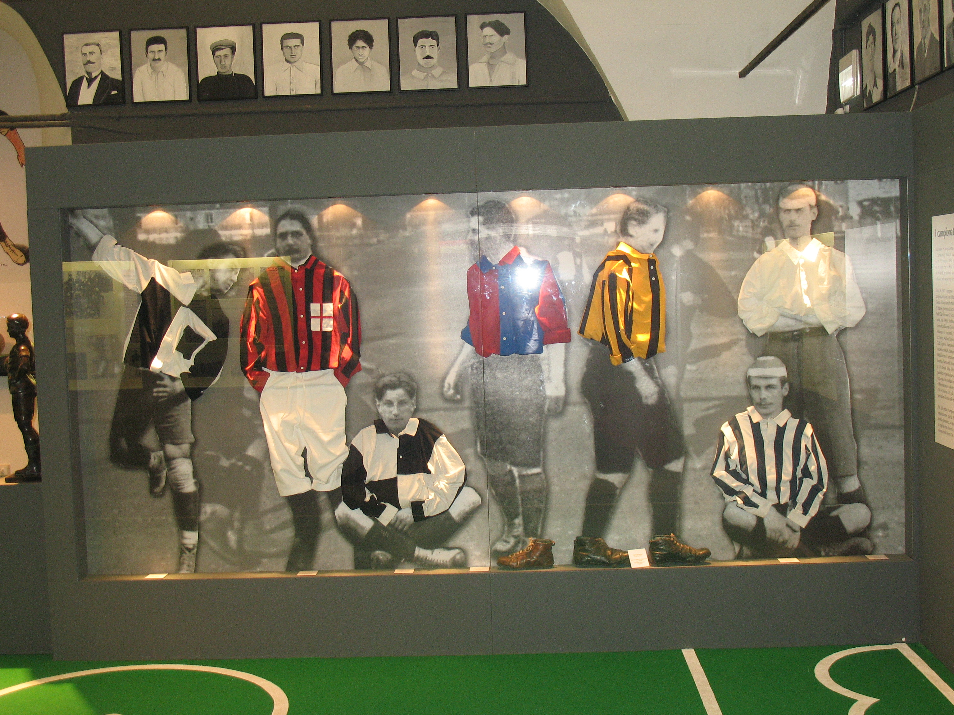 Museo della Storia del Genoa, Genova, Italia.